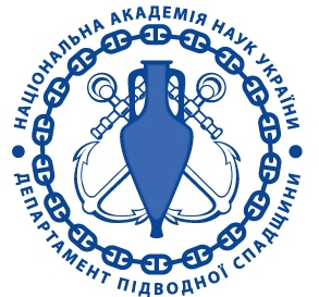 Эмблема ДПН ИА НАНУ